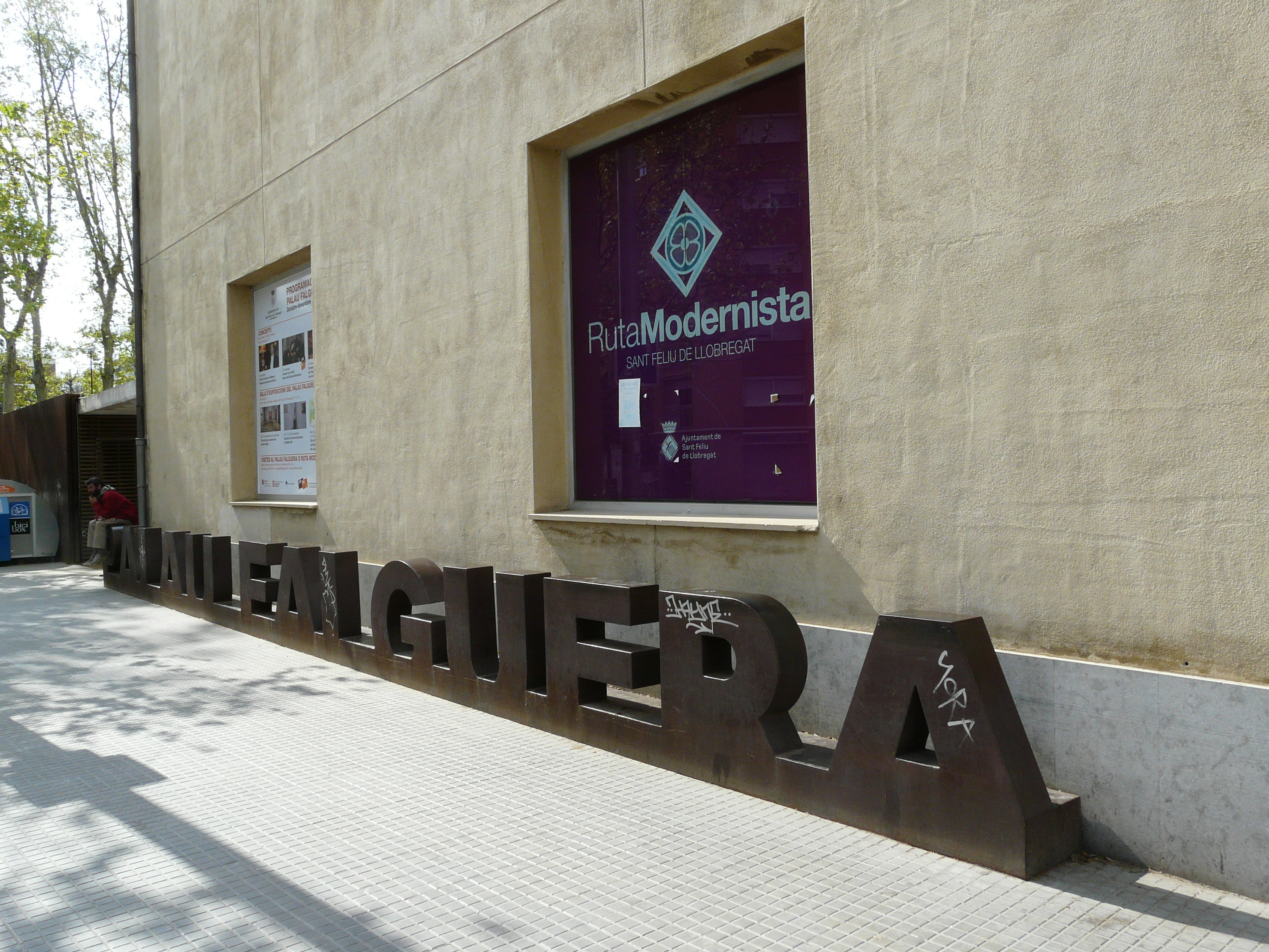 Can Falguera (Sant Feliu de Llobregat) Object location41° 22′ 51.35″ N, 2° 02′ 34.32″ E